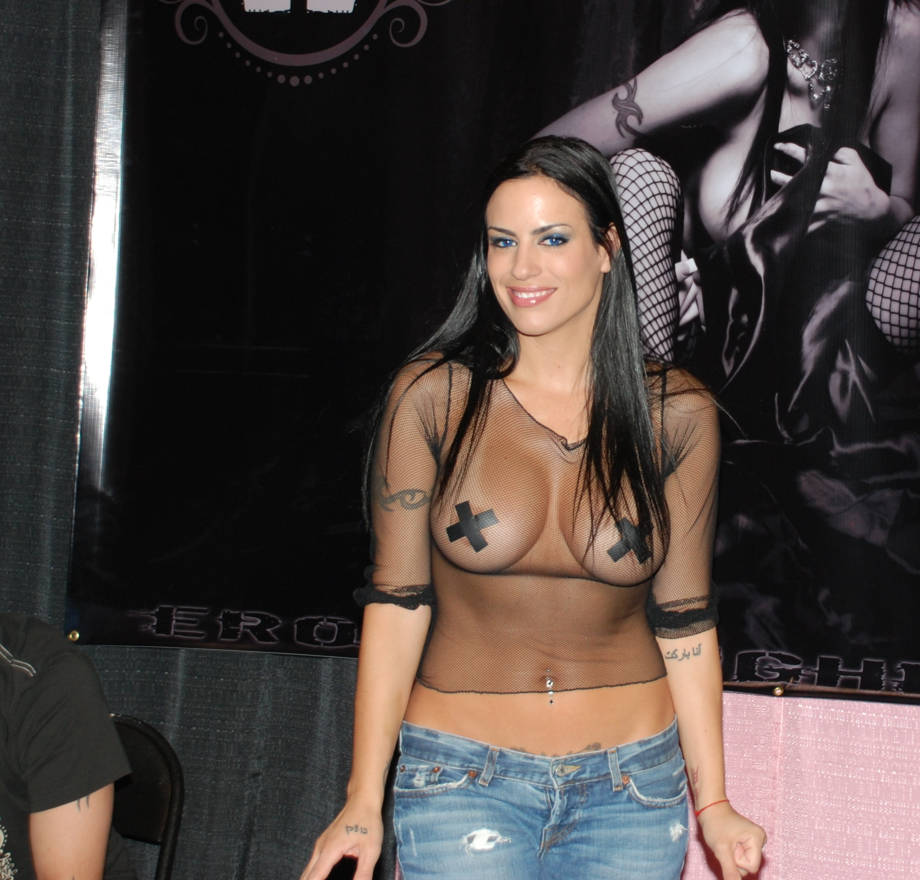 Miami Eroticaxxx 5-9-09 Nikon 129